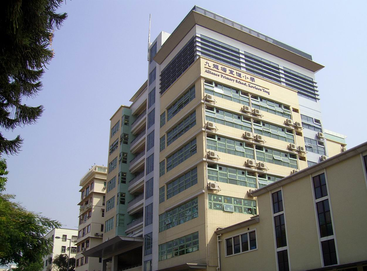 九龍塘宣道小學